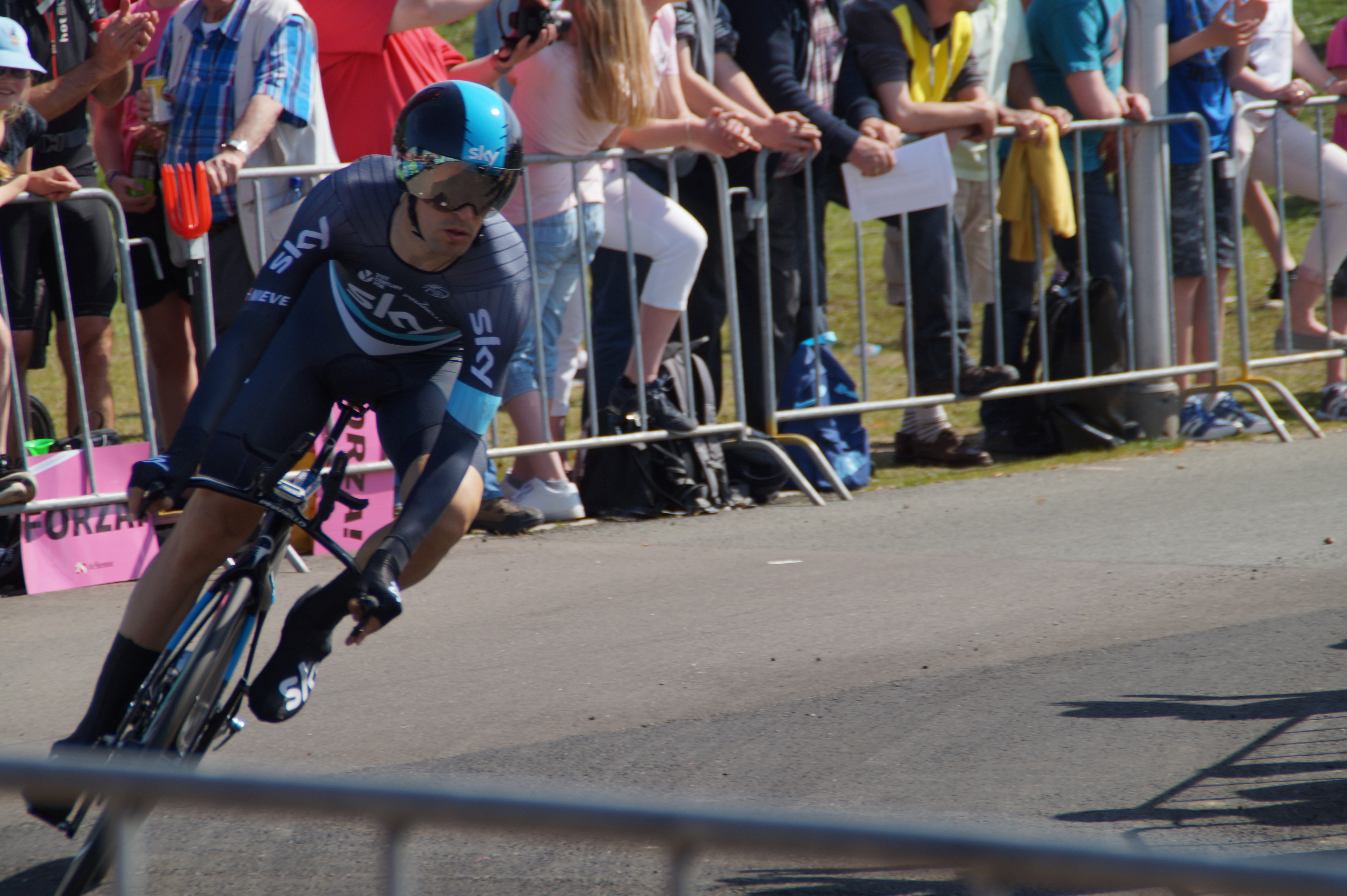 Mikel Nieve